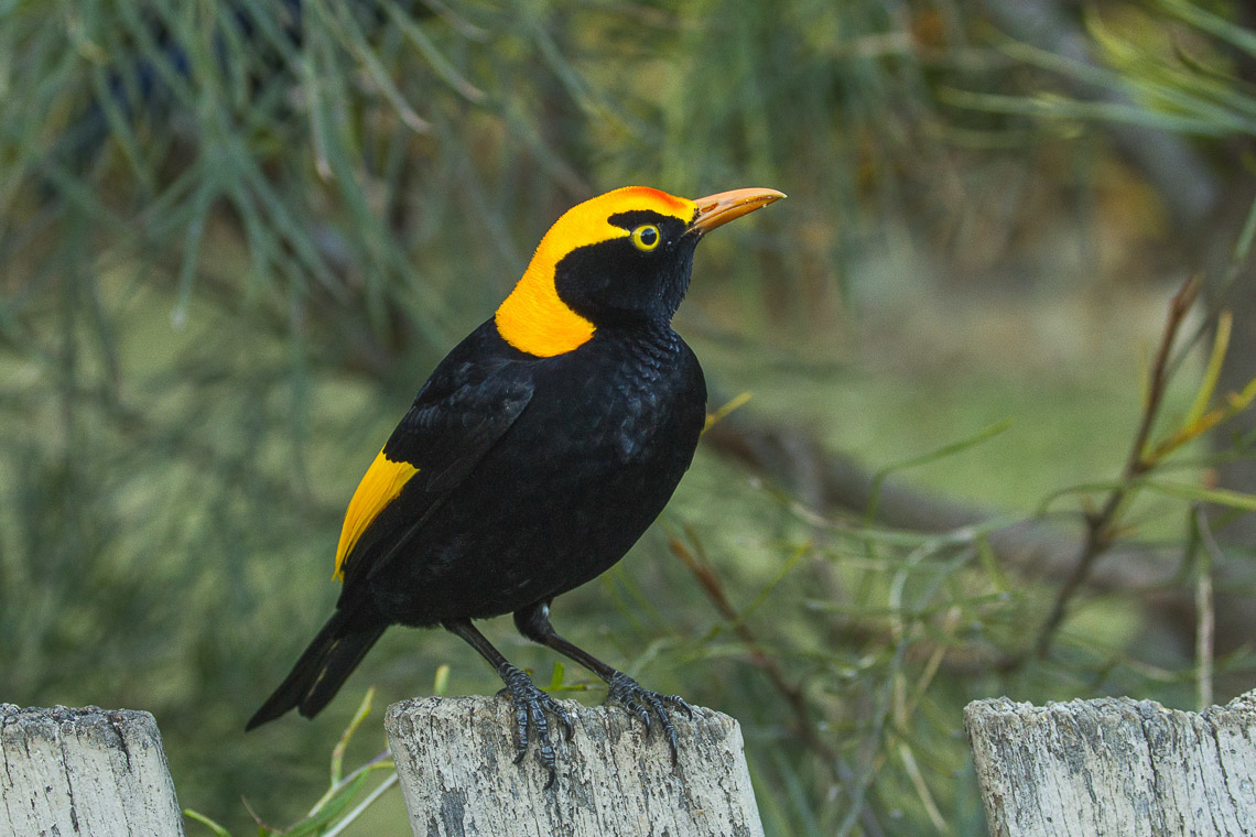 Regent Bowrebird - Lamington NP - Queensland_MG_3860